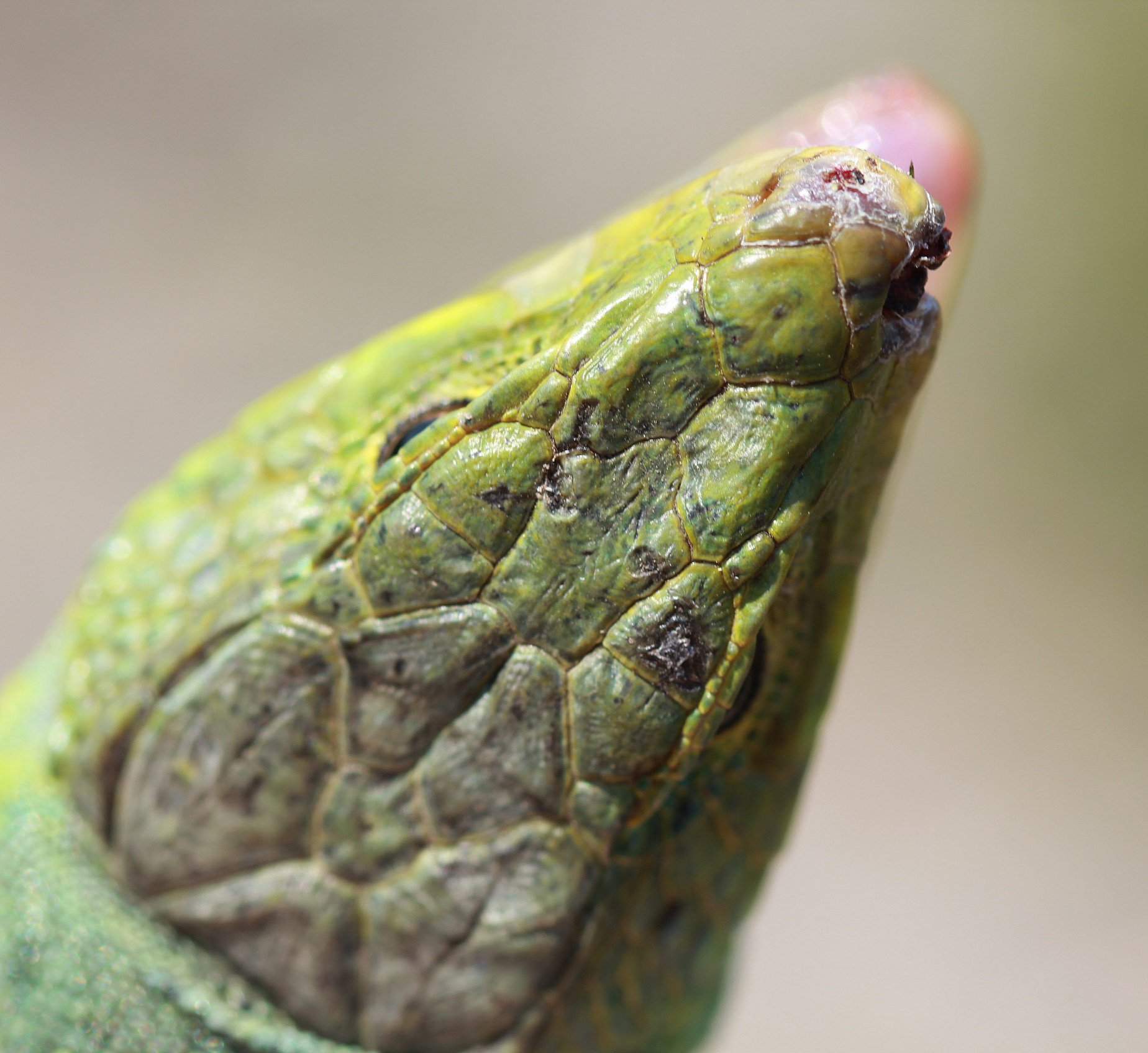 Blessures craniennes d'un Lézard ocellé (Timon lepidus)